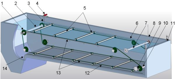 3D-Zeichnung eines Kunststoffkettenräumers.